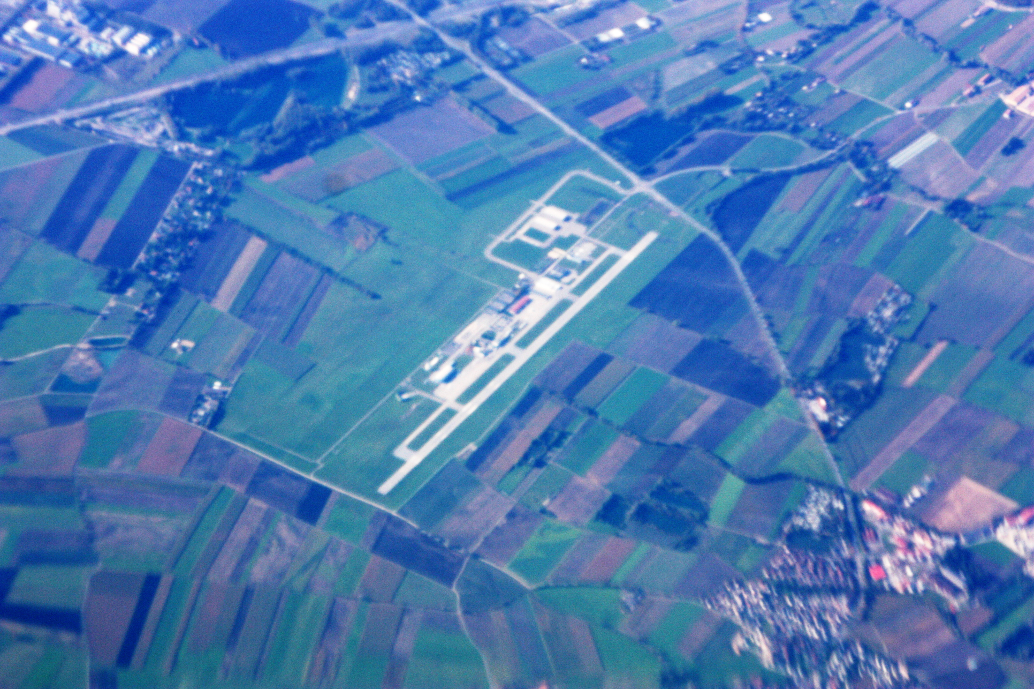 1 Flug von Frankfurt/Main nach Sofia; Start 10:12 MEZ; Landung 13:06 MEZ; Oktober 2010; Flughafen Augsburg; Bilckrichtung nach Süd-Süd-WEst